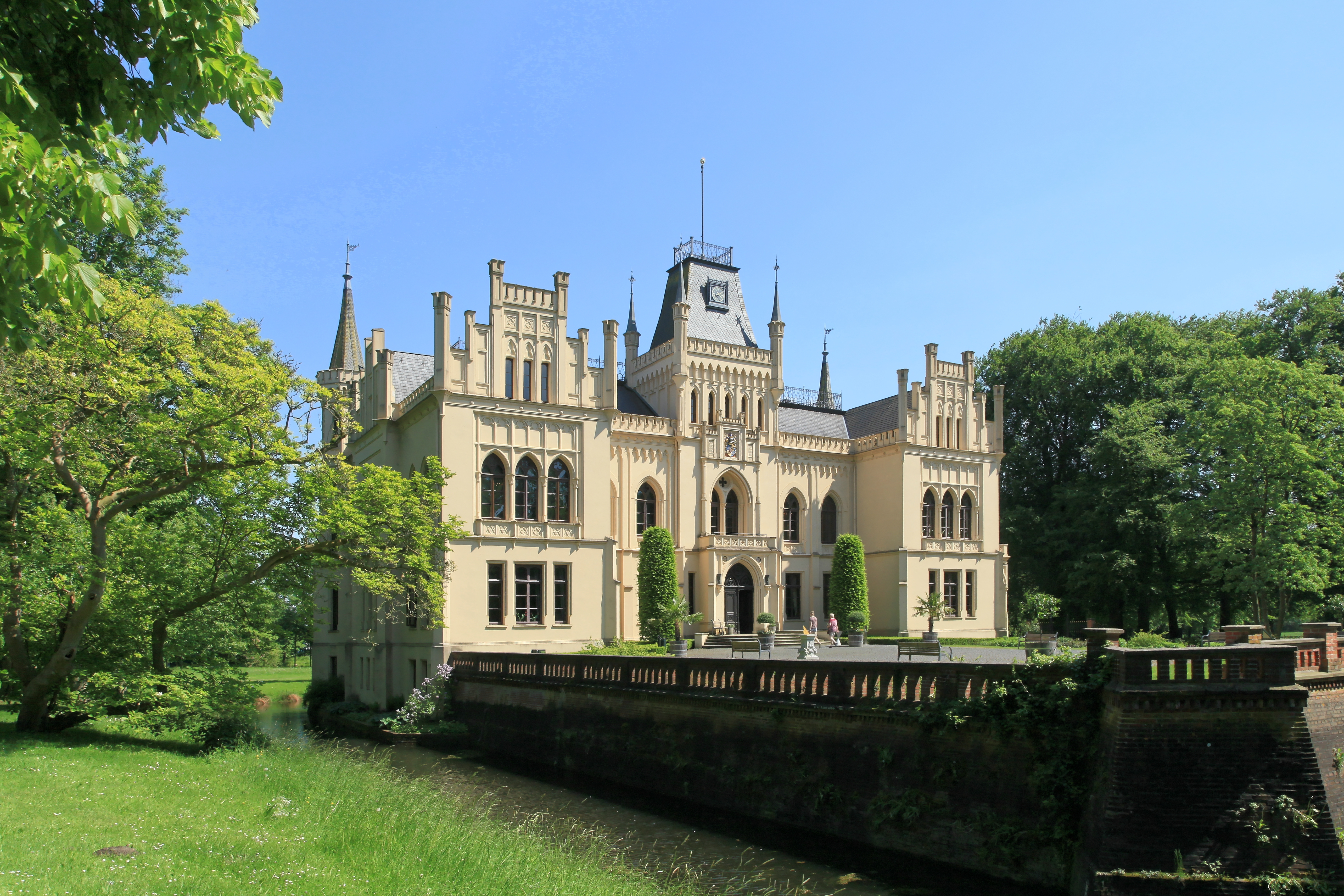 Evenburg im Evenburgpark in Leer (Ostfriesland)